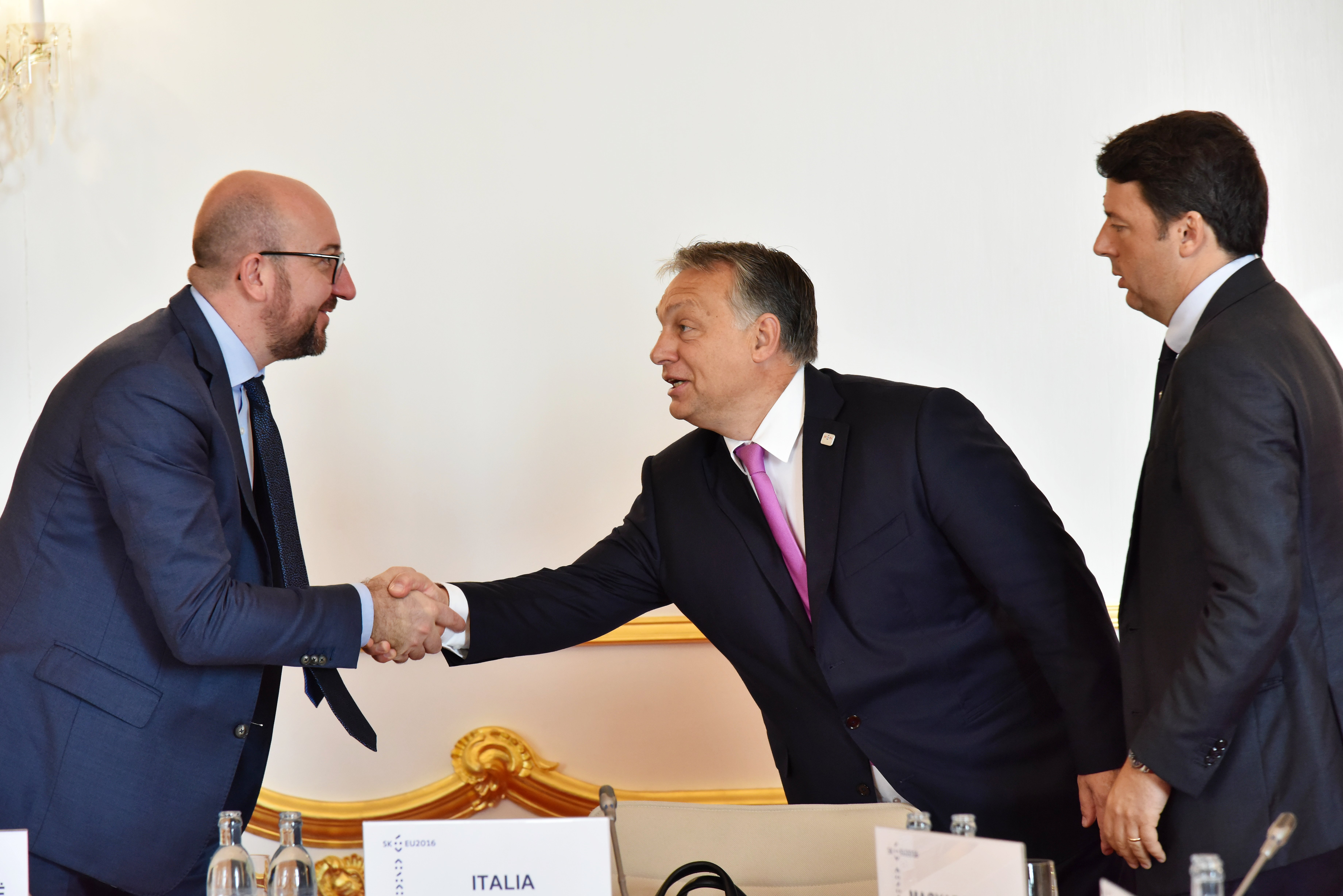 BRATISLAVA SUMMIT 16 SEPTEMBER 2016 ph halime sarrag